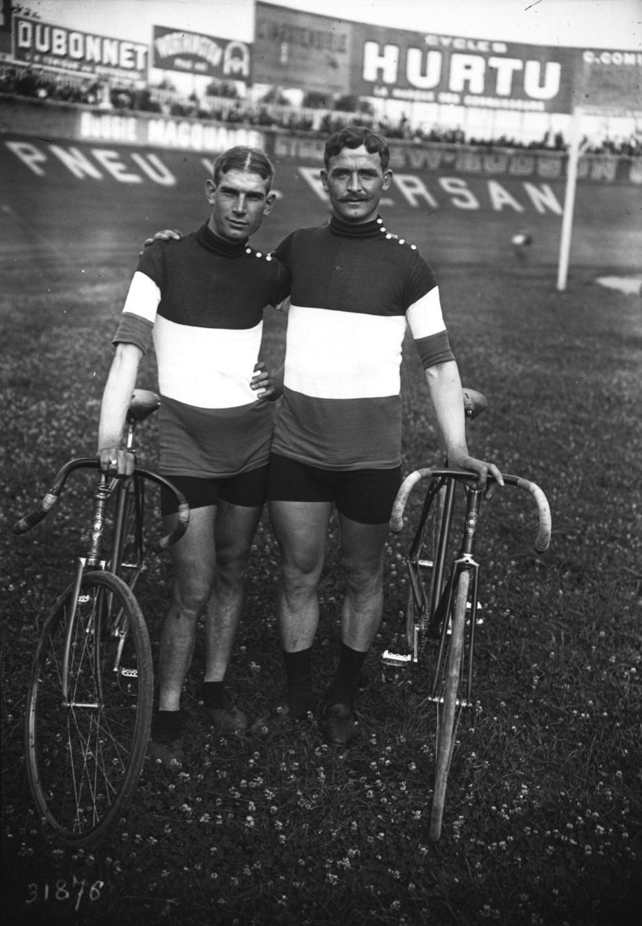 Émile Engel (à gauche) et François Faber (à droite) lors des six jours du vélodrome Buffalo en 1913.